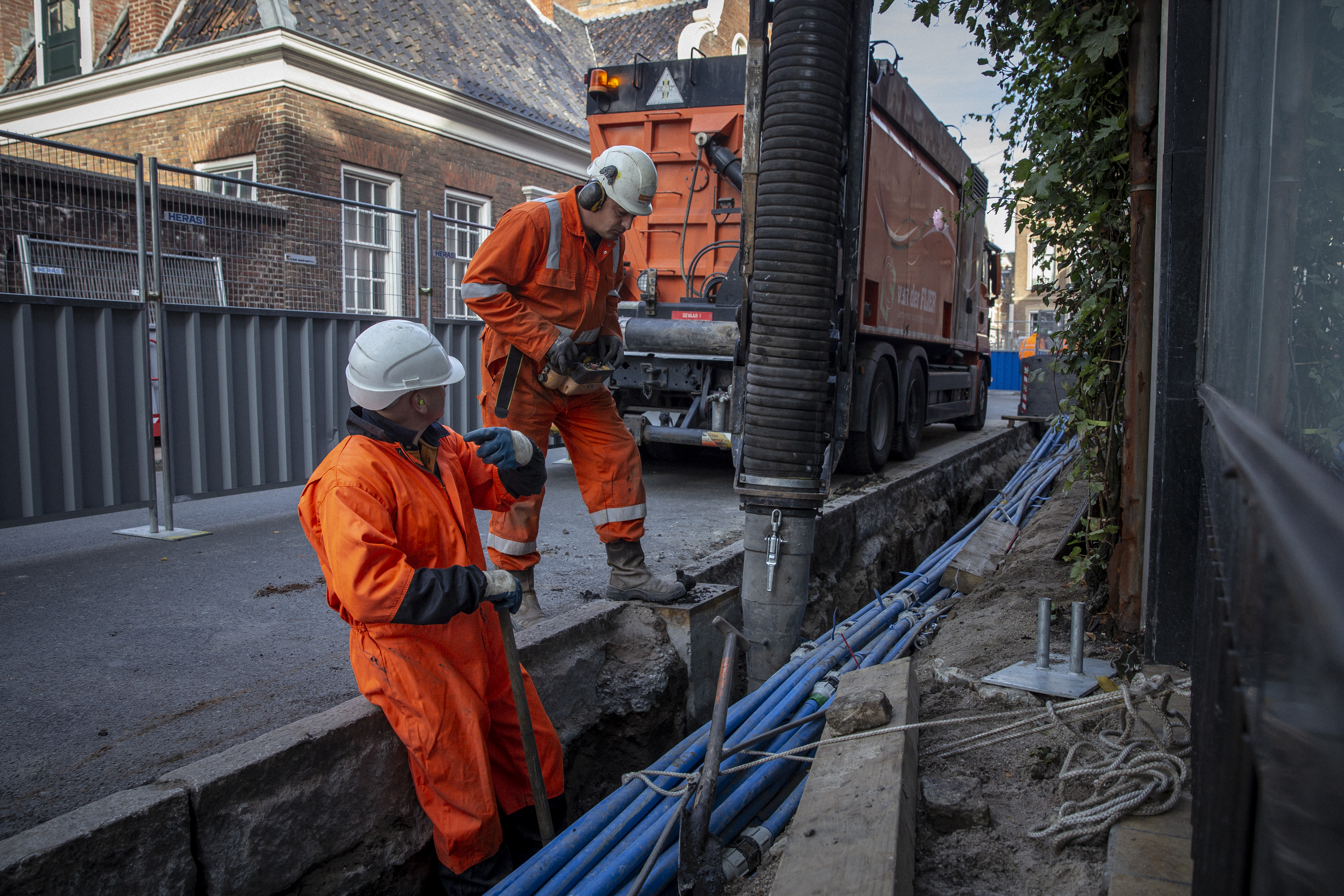 Kabels en leidingen vrij zuigen in stedelijk gebied.